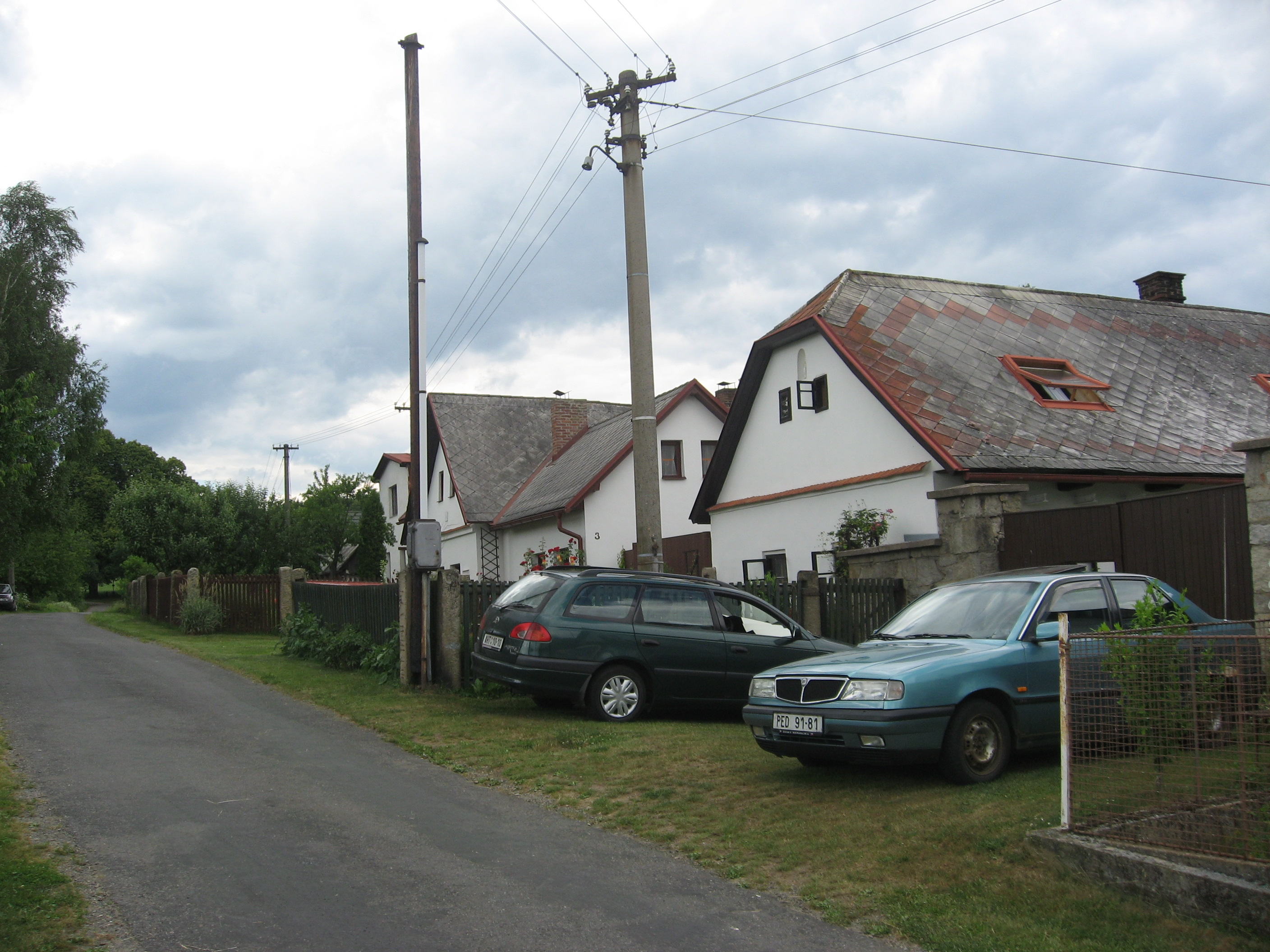 Mozerov